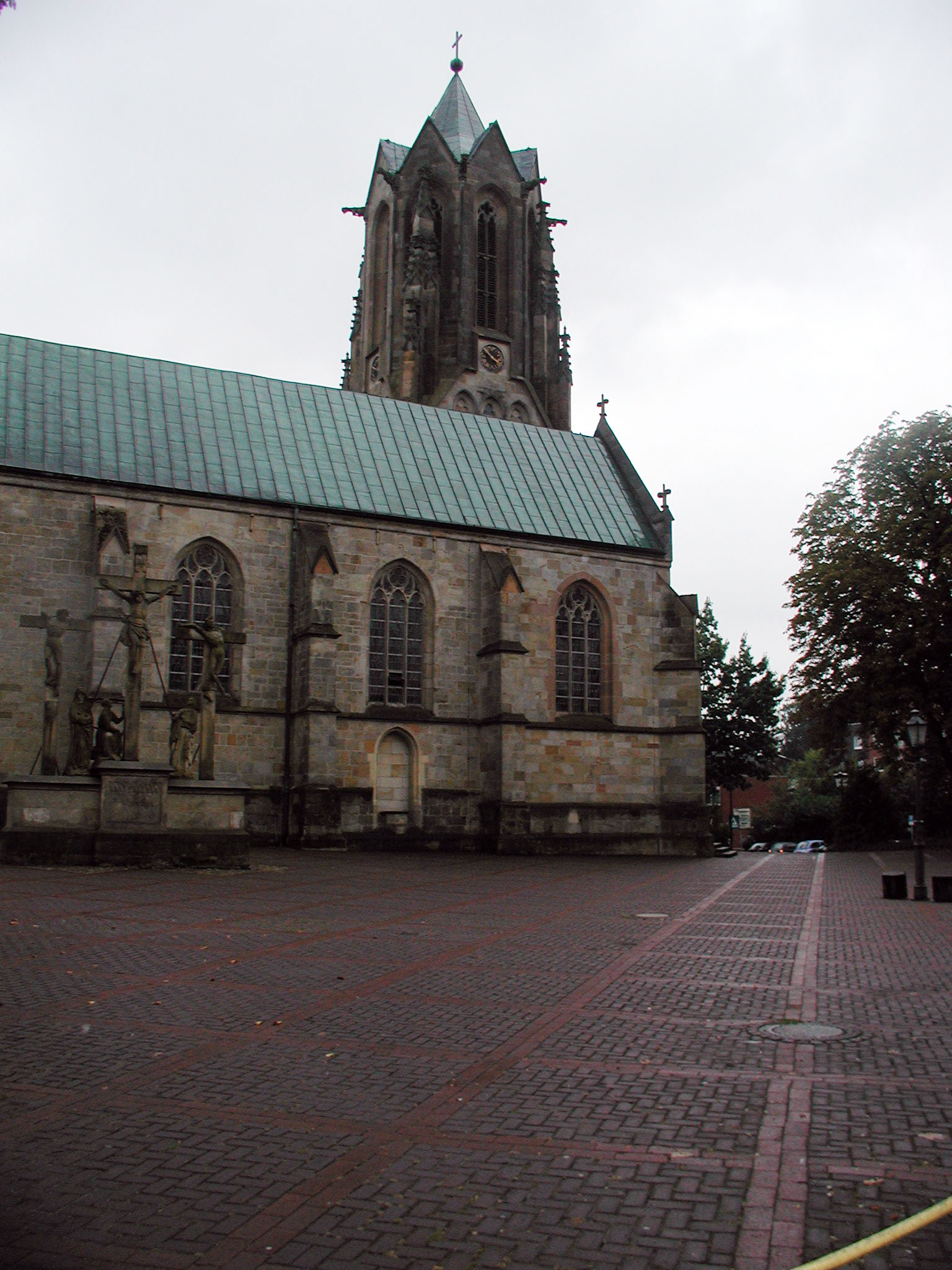 Meppen, Probsteikirche St. Vitus